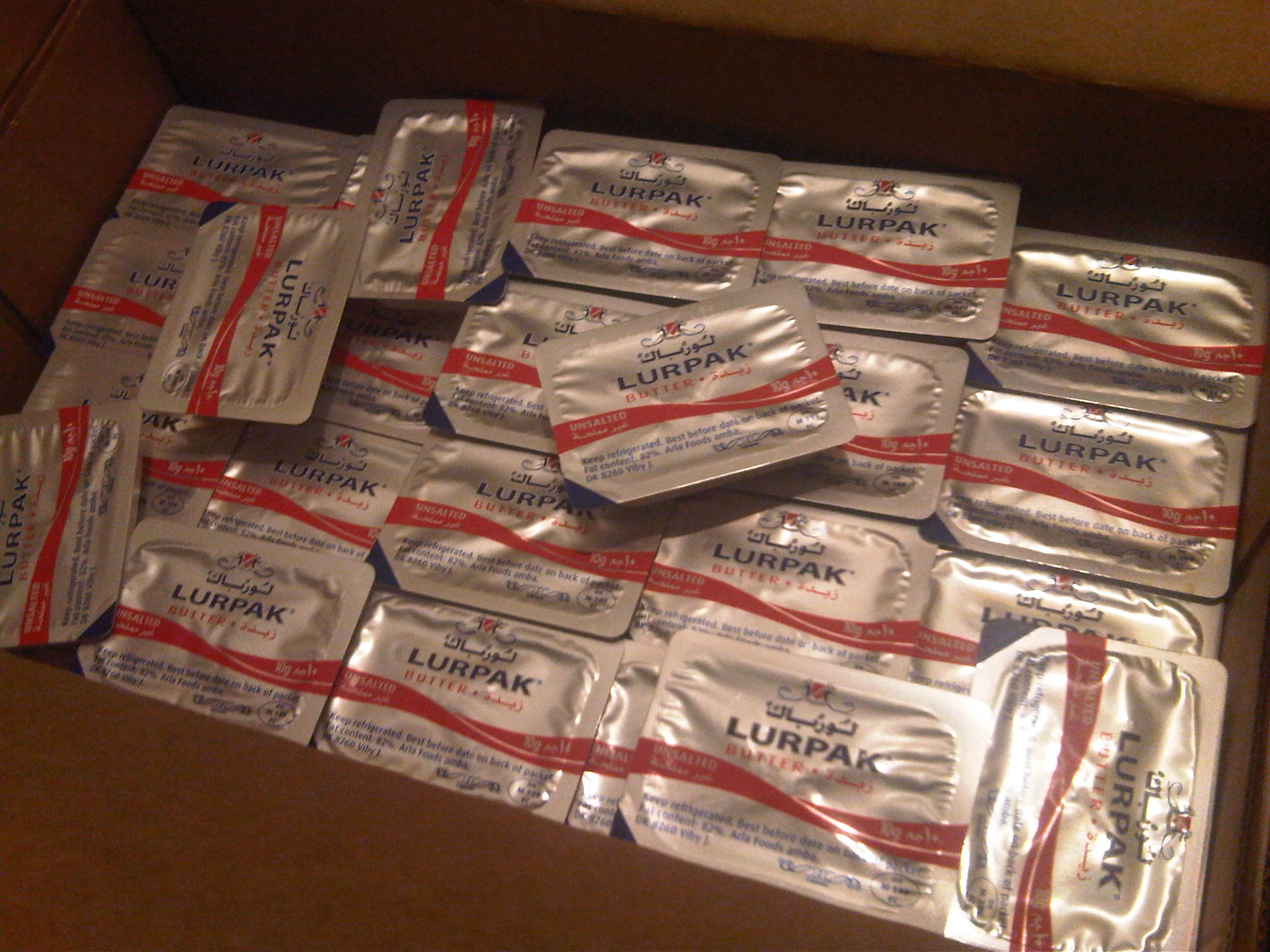 زبدة نون